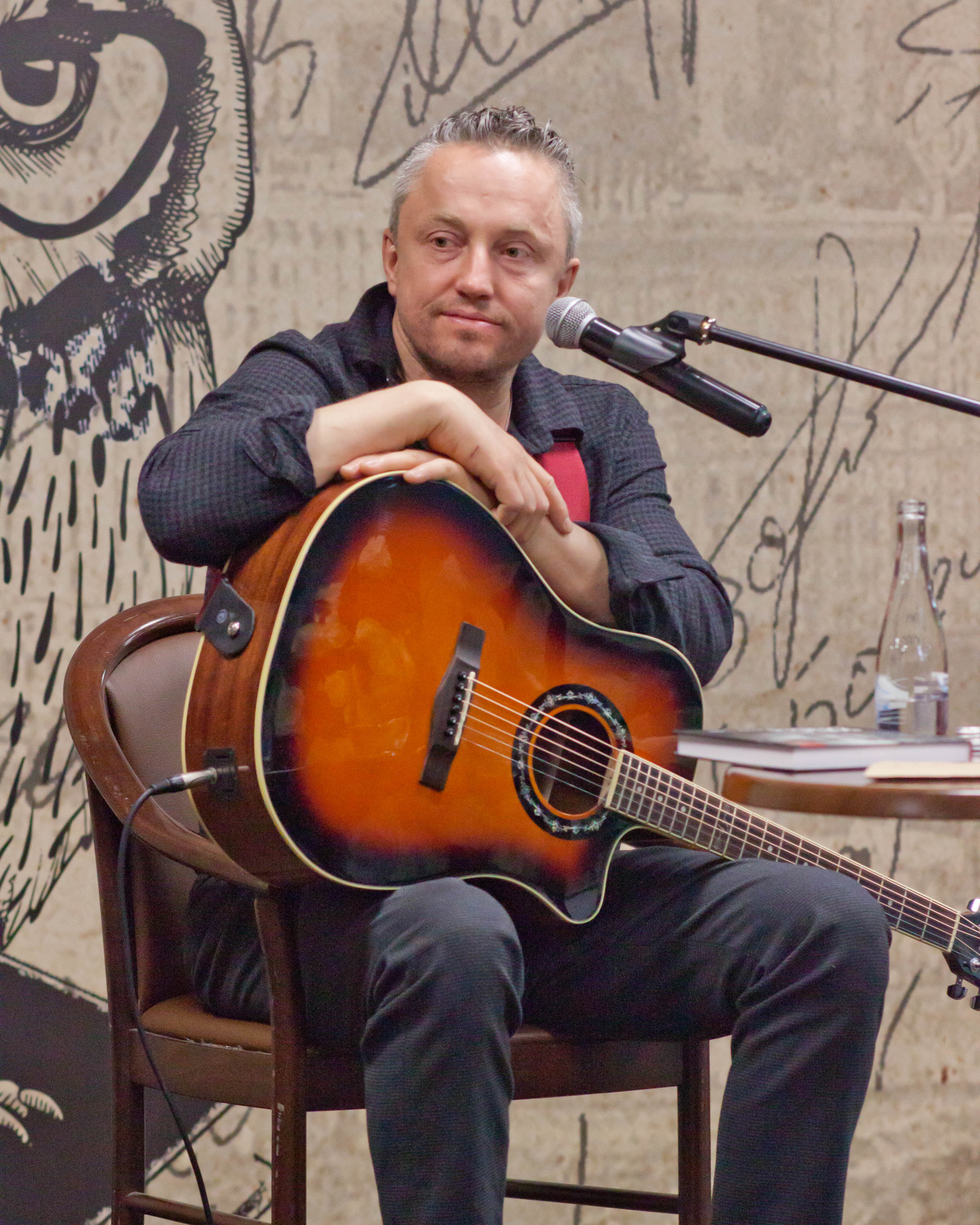 Павел Кашин на презентации книги "По волшебной реке" в "Московском доме книги" на Новом Арбате